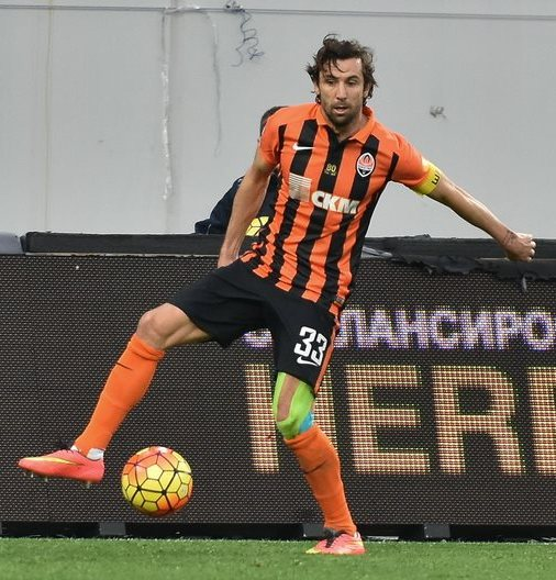 Даріо Срна - хорватський футболіст